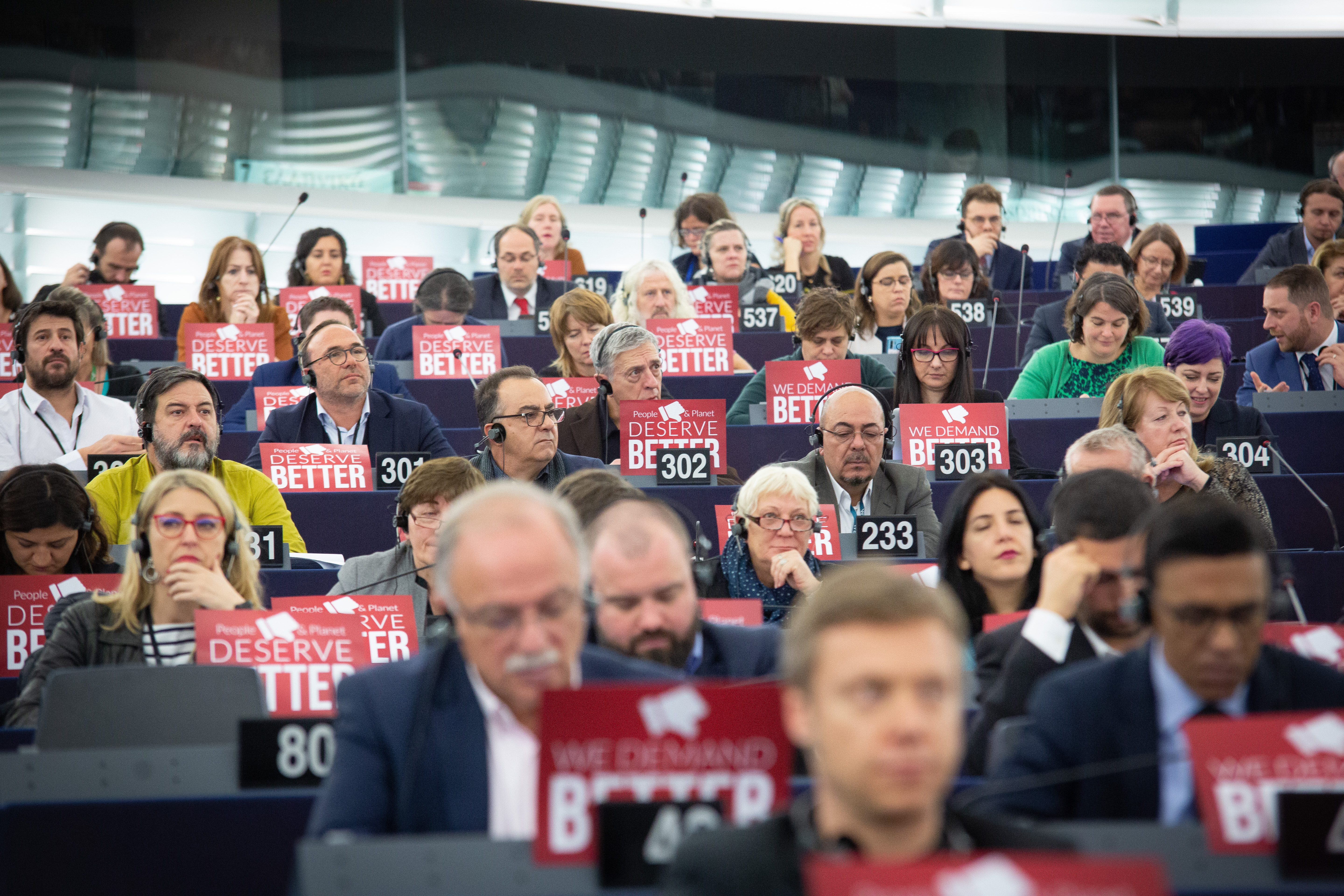 F70A6075